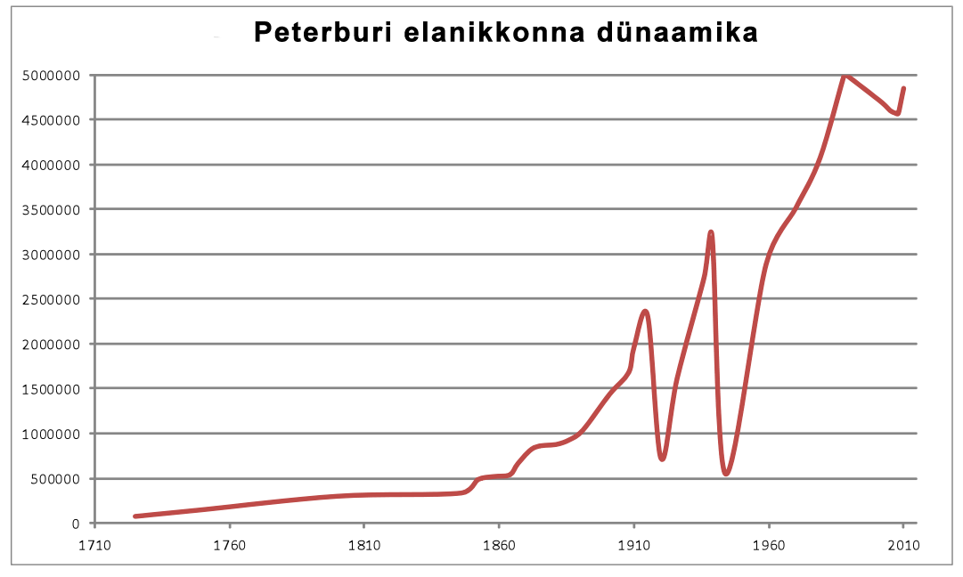 Peterburi elenikkonna dünaamika